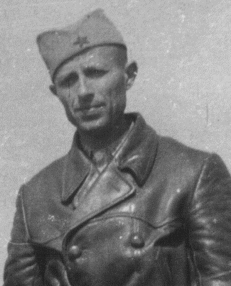 Mitar Bakić, ritaglio da File:Arso Jovanović, Mitar Bakič and Ivan Milutinović.jpg.